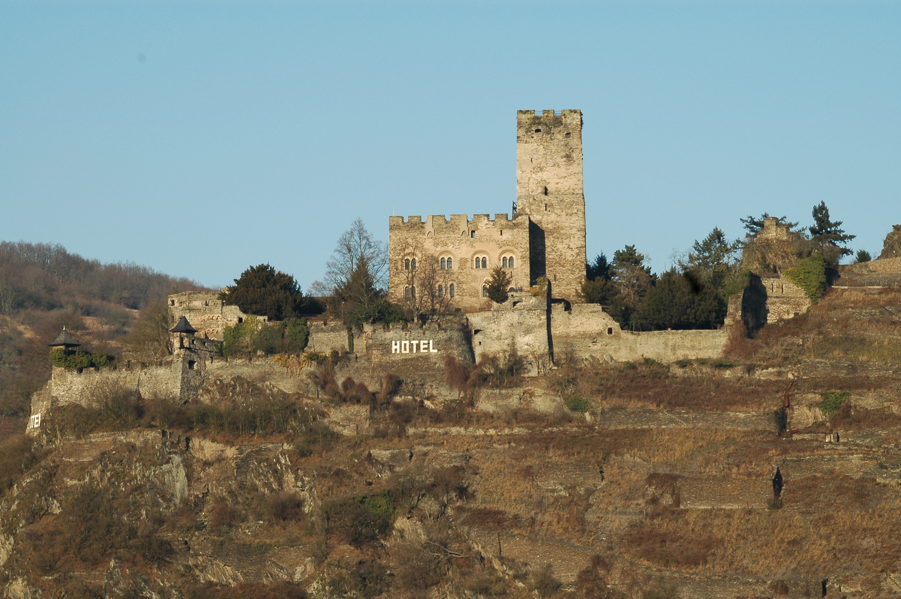 Burg Gutenfels (Kaub)